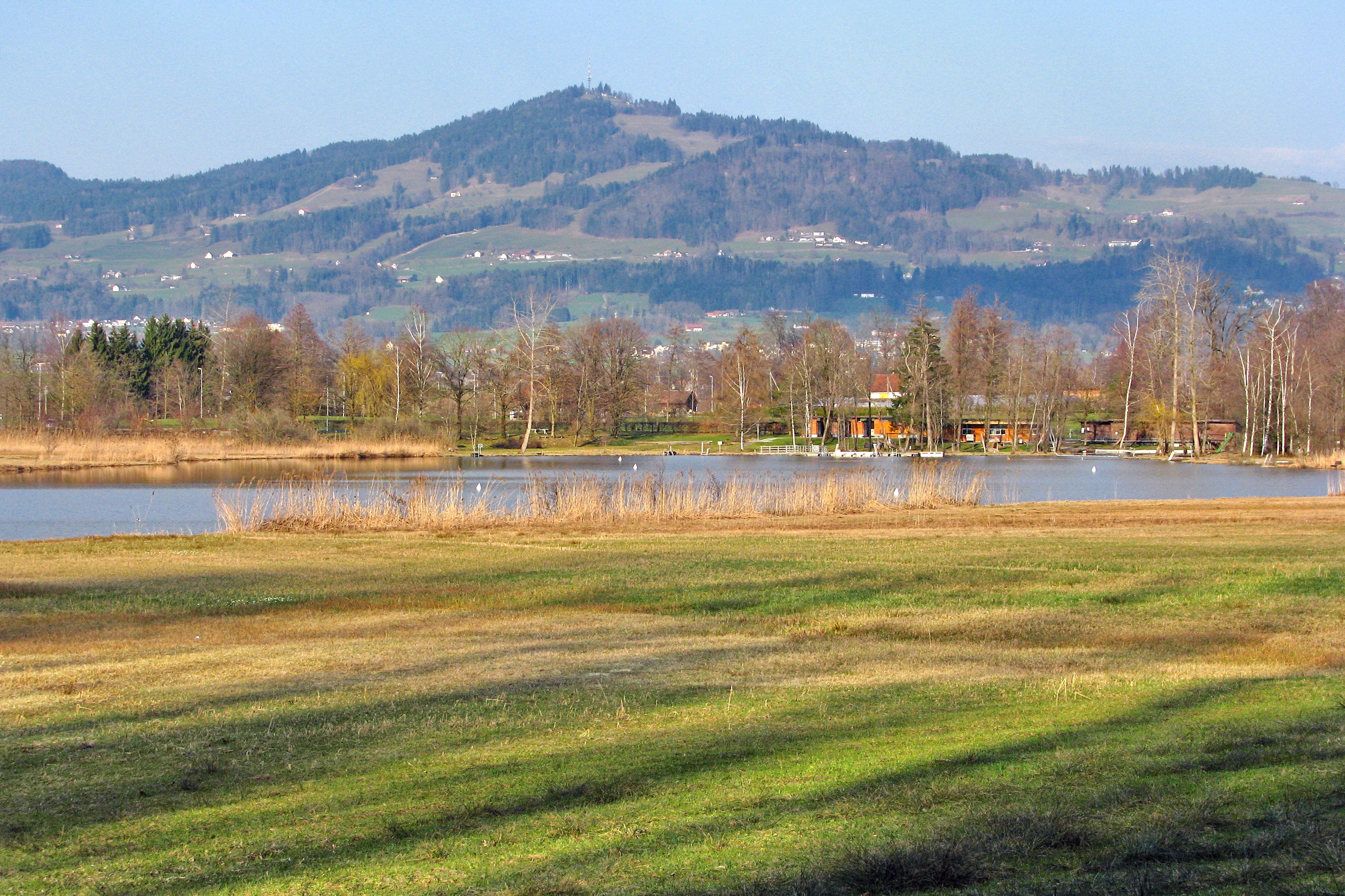 Egelsee in Bubikon (Switzerland), Bachtel in the background.